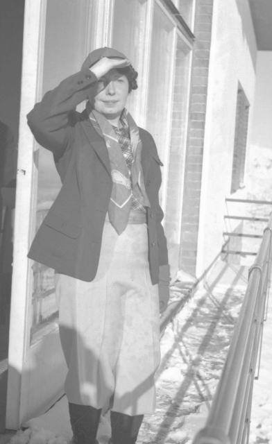 Milada Rádlová (1903-1989), dcera třetího československého prezidenta Emila Háchy